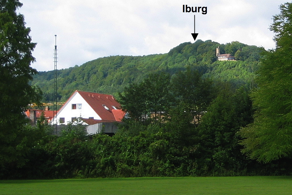 Lage der Iburg neben dem Kaiser-Karls-Turm und der Sachsenklause, Bad Driburg, Deutschland. Blick aus dem Driburger Kurpark zum Iberg.